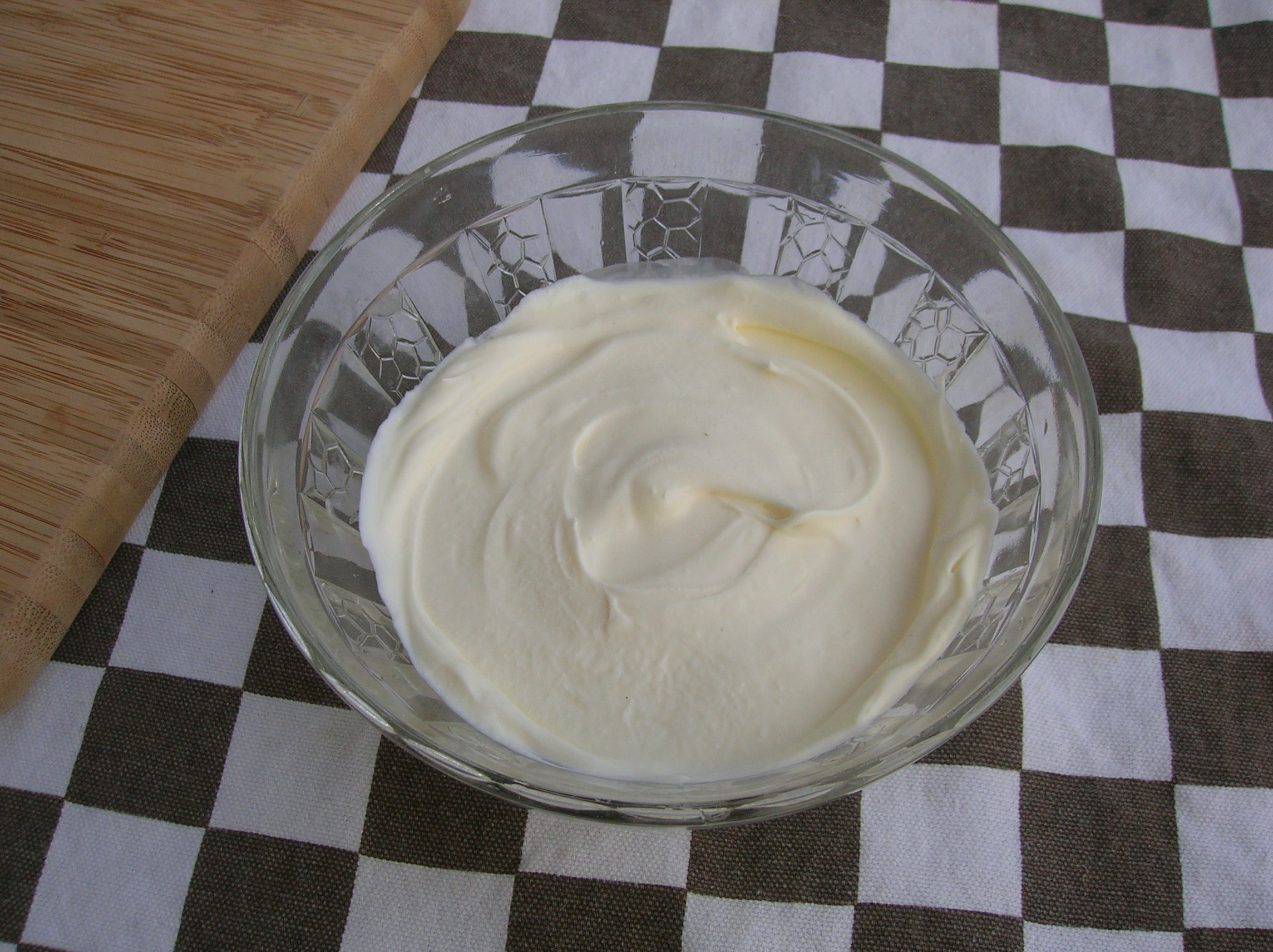 La crème fraîche d'Isigny est un produit AOC français.